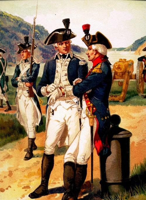 Infanterie und Artillerie der Kontinentalarmee, 1783